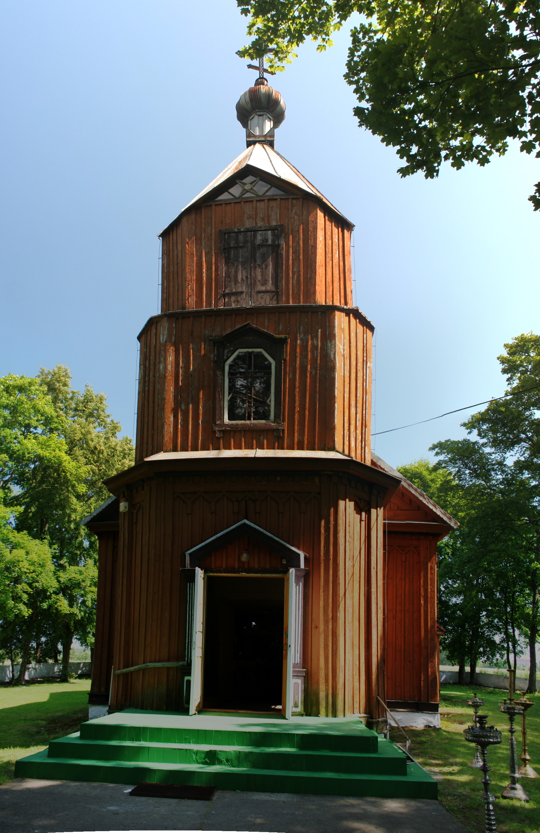 Kościół Świętych Apostołów Piotra i Pawła w Samogródzie.